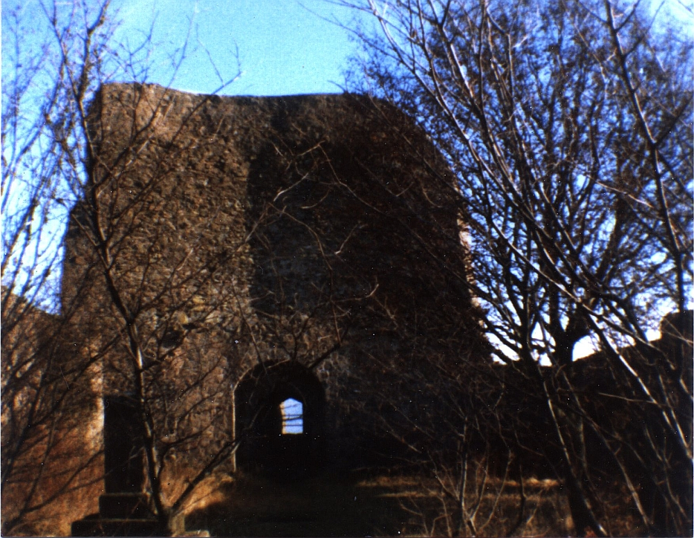 Michelsburg auf dem Remigiusberg (Pfalz)